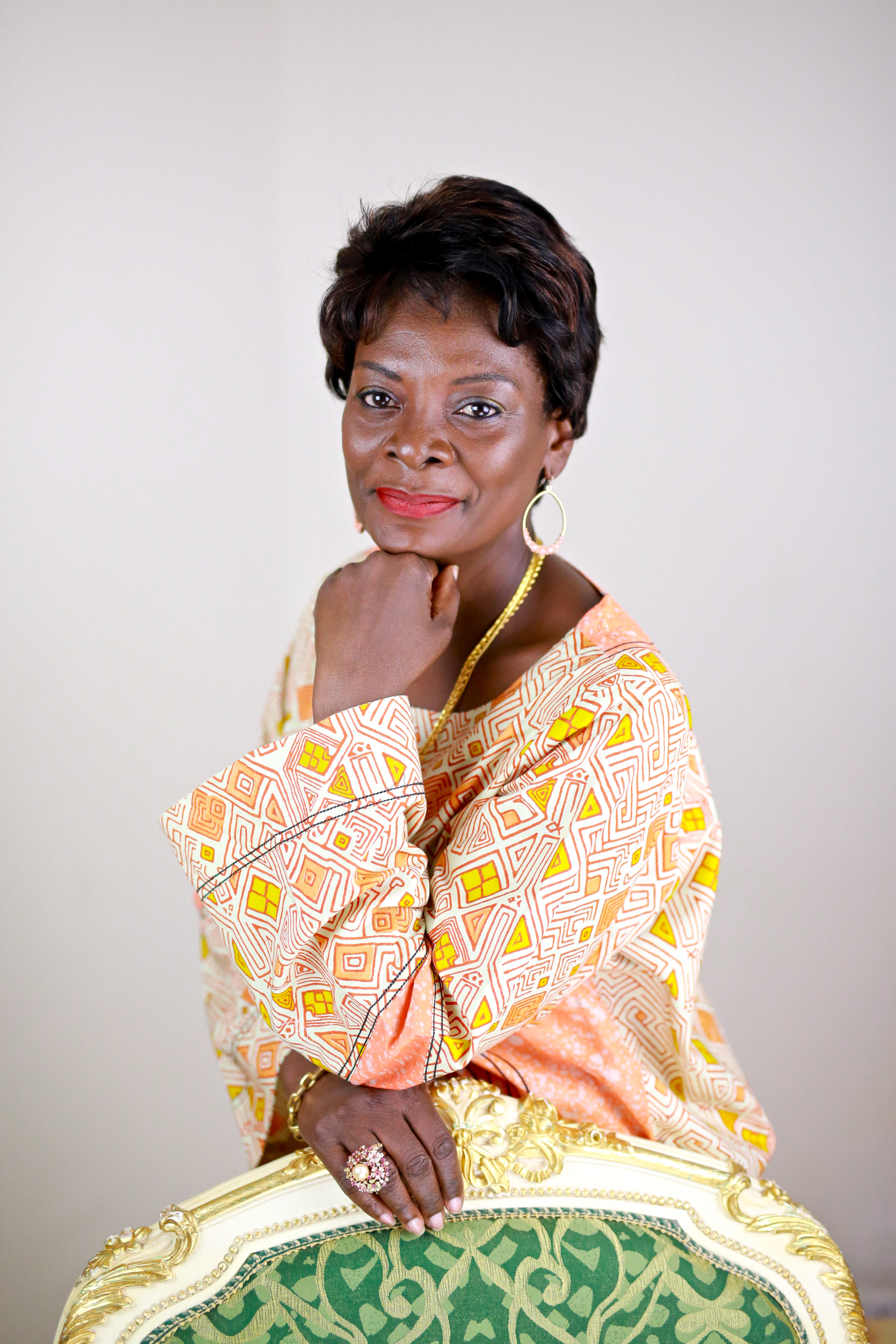 Photo officielle